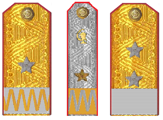 погоны оставников